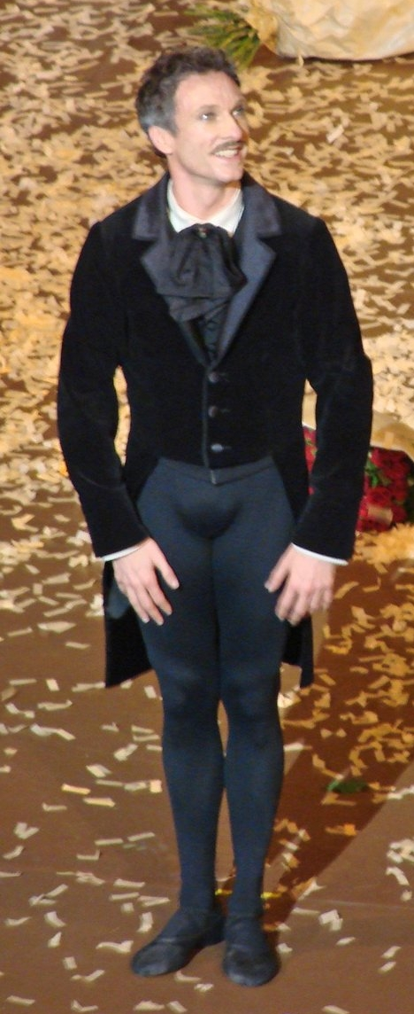 L'ovation faite à Manuel Legris, danseur étoile du ballet de l'Opéra pour sa dernière représentation dans Eugène Onéguine, le 15 mai 2009.